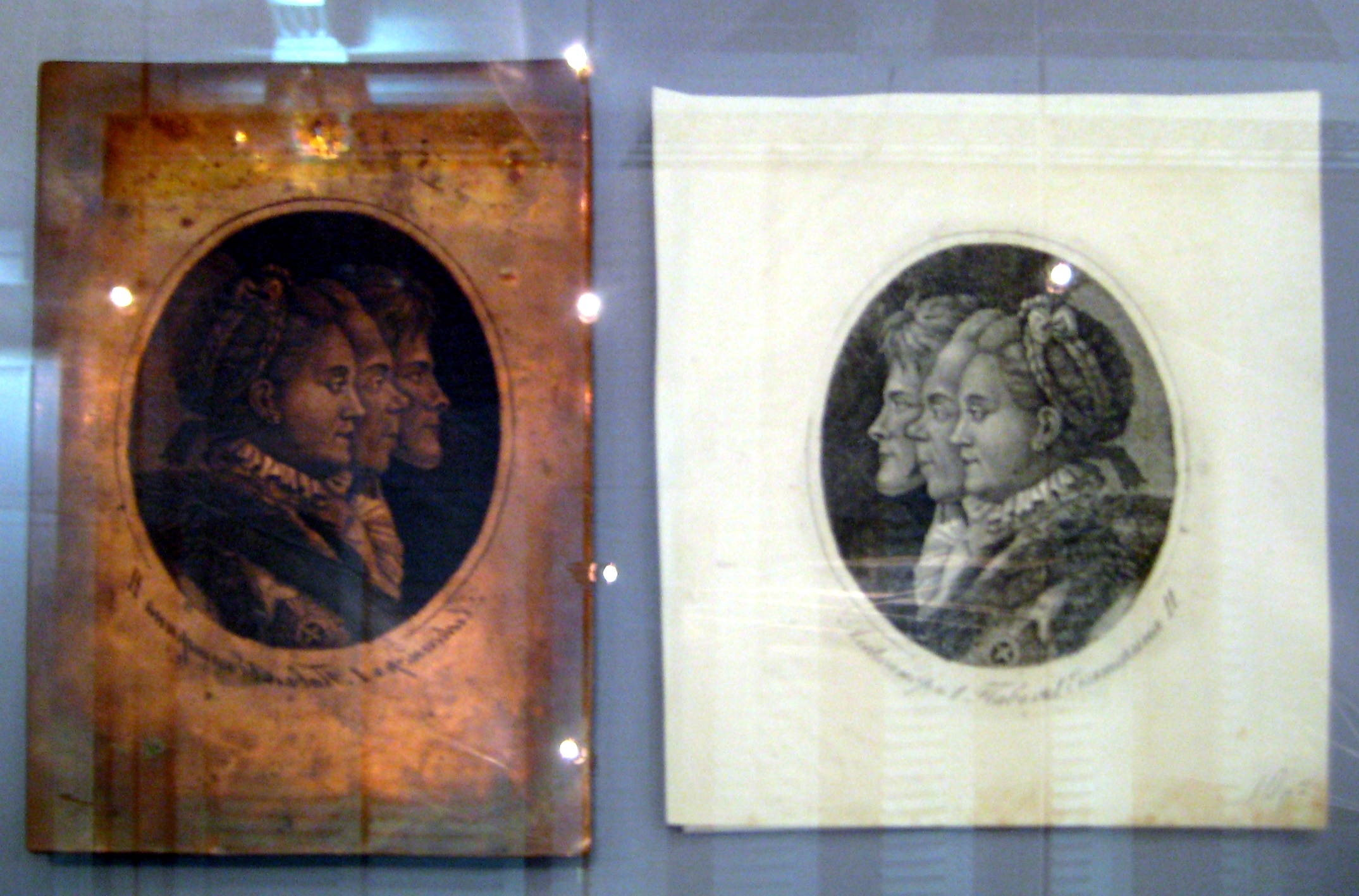 Неизвестный художник 18 века. Екатерина II, Павел и Александр Павлович. Гравюра и металлическая пластина-исходник. ГИМ